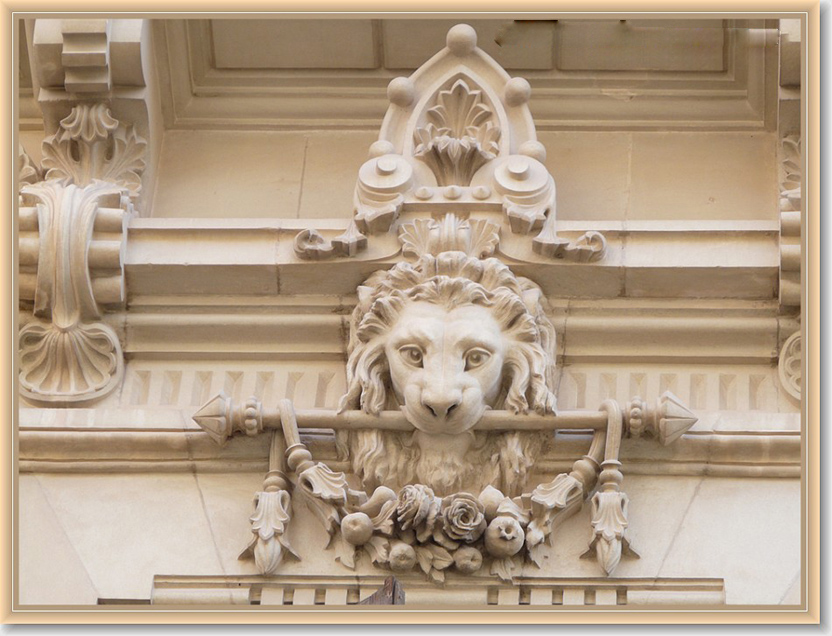 Detalle de la fachada de la casa modernista de Novelda. Anastasio Martínez Hernández